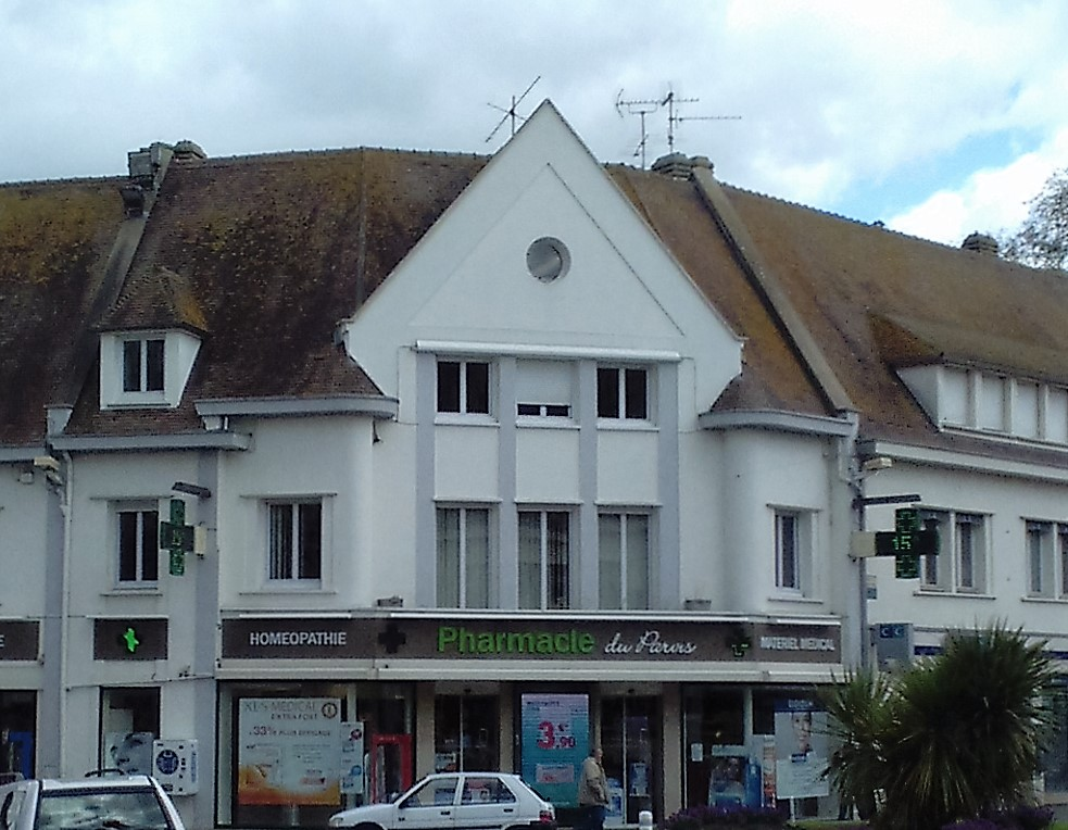 Louviers centre - architecture de la reconstruction.